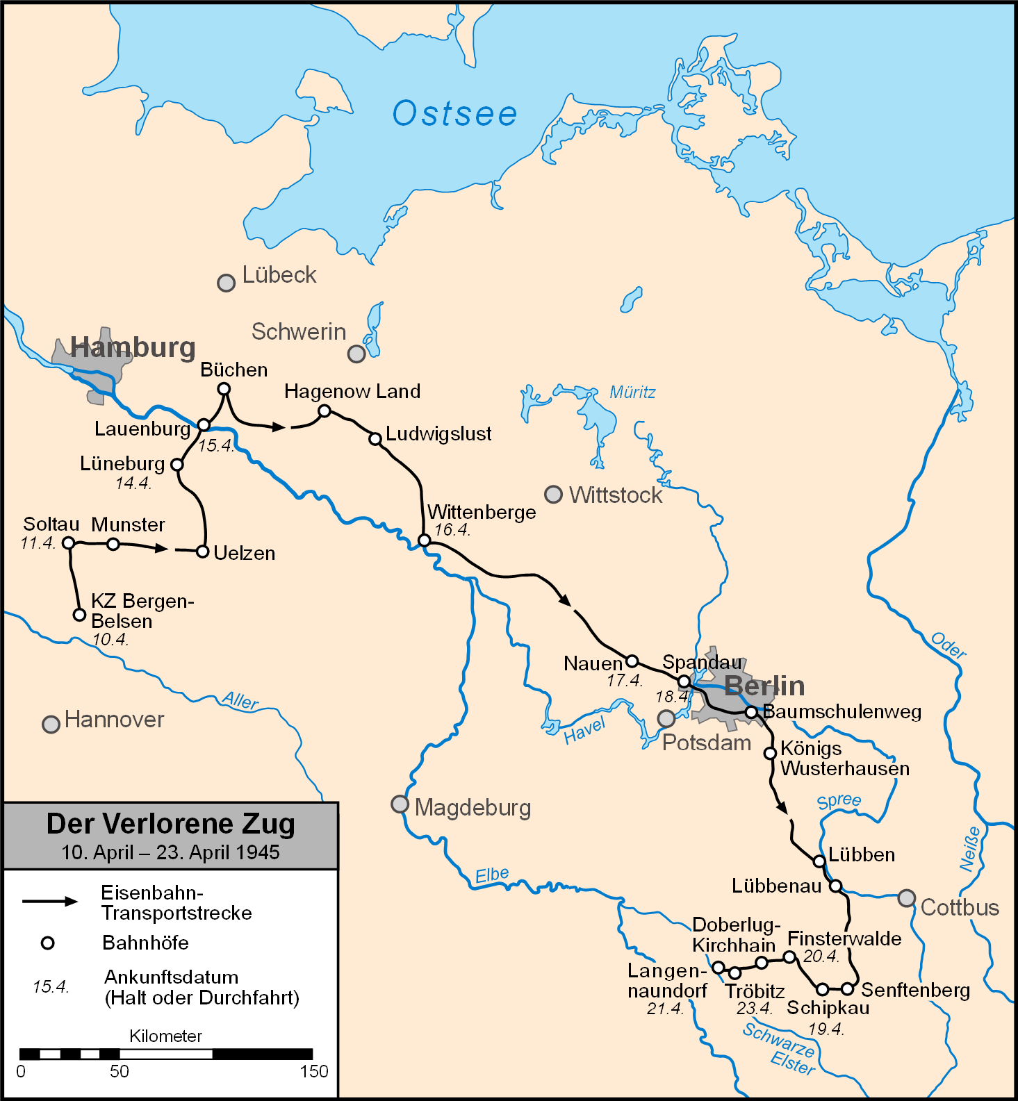 Vermutete Fahrstrecke des Verlorenen Zuges